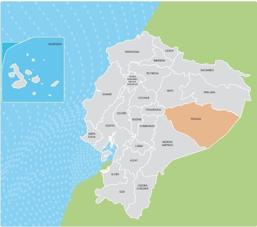 Pastaza, provincia del Oriente Ecuatoriano